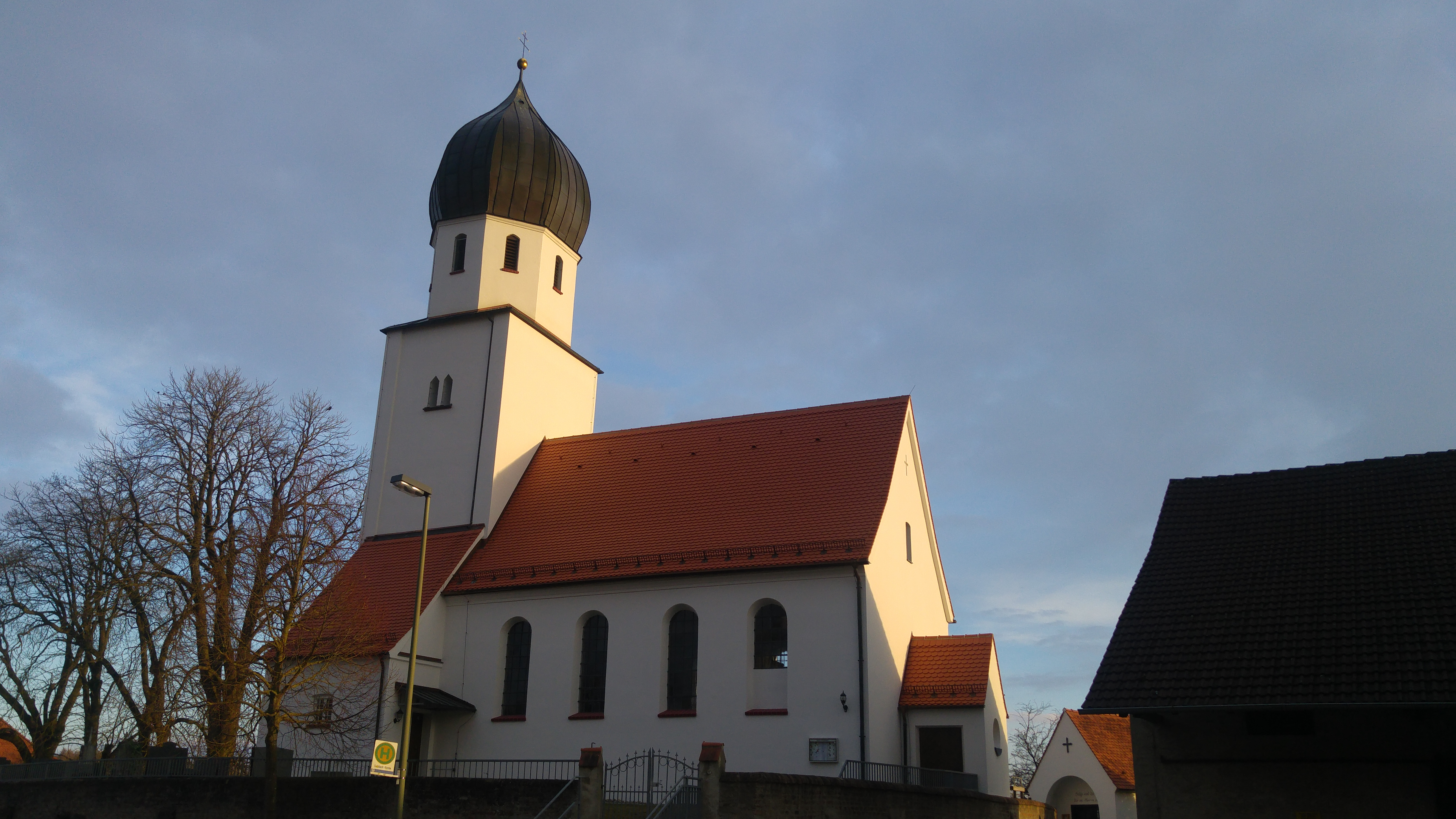 Baudenkmal Aktennummer D-7-71-113-87 Katholische Pfarrkirche St. Verena, Saalbau, Unterbau des Chorturms 13./14. Jahrhundert, im 18. Jahrhundert erhöht, Langhaus 1724, erweitert 1869; mit Ausstattung.